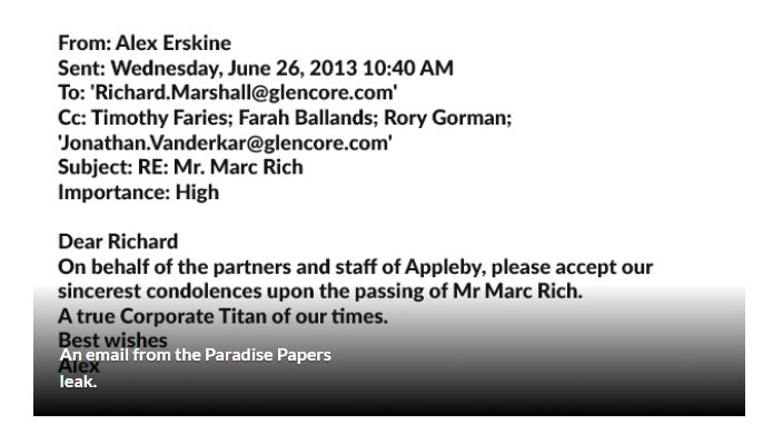 Email zum Tod von Glencore-Gründer Marc Rich in den "Paradise Papers"